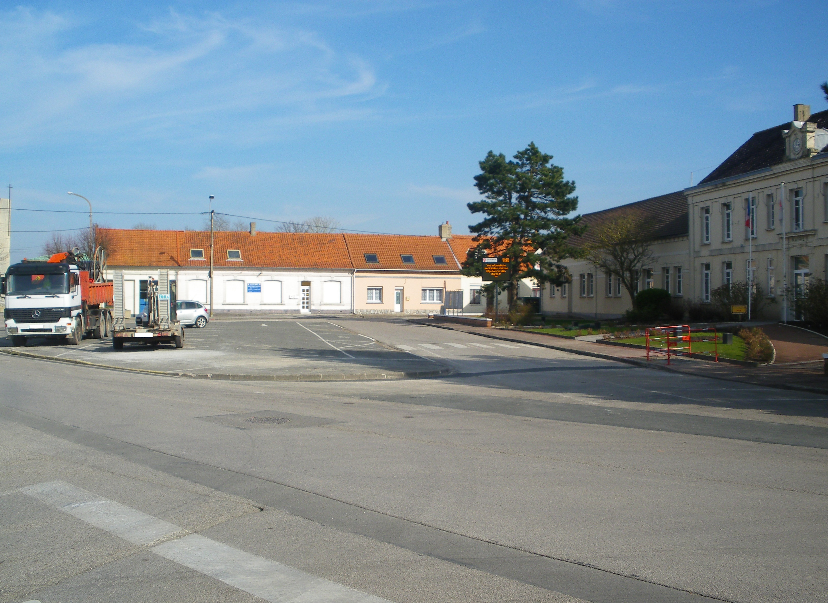 Vue de la place de l'Europe de Marck. Sur la droite se trouve la mairie, au fond la bibliothèque.